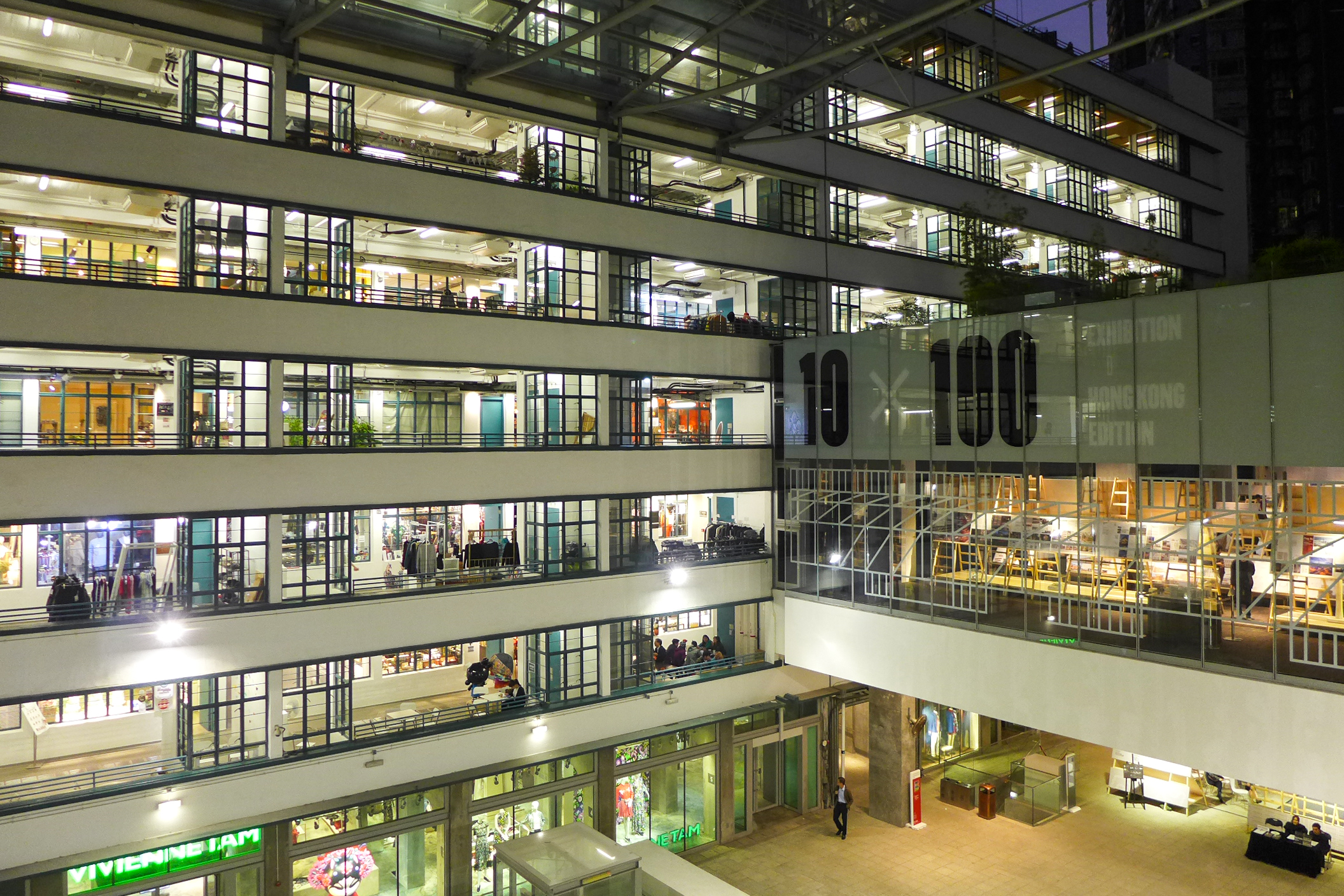 PMQ Night view